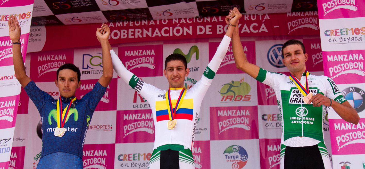 CRI Hombres Elites Campeonatos Nacionales de Ruta Boyacá 2016